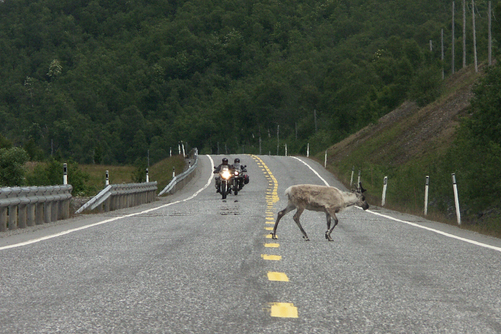 EUropaveg 6 nær Kvænangen